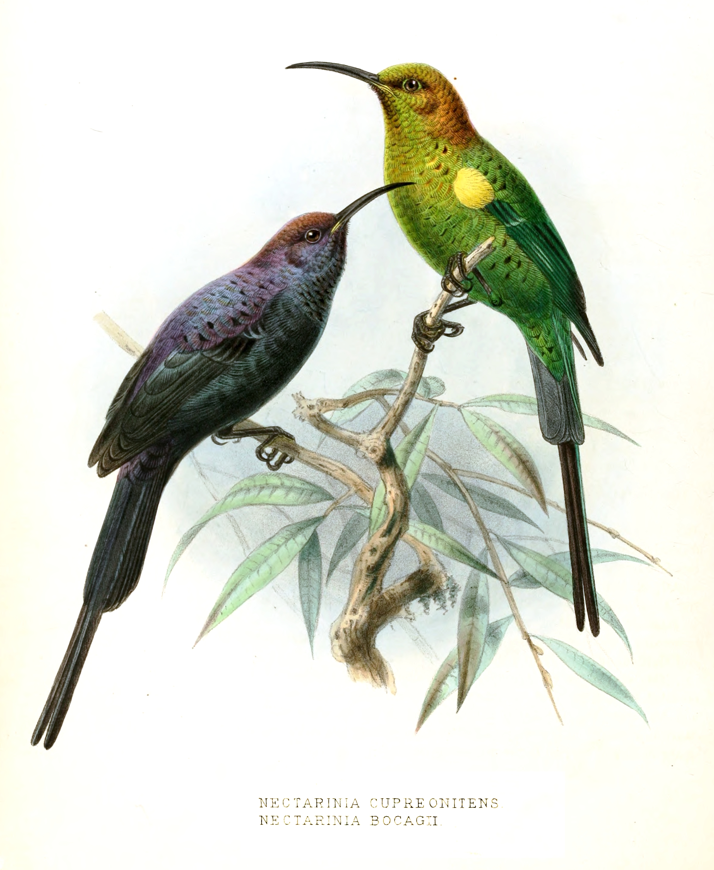 Nectarinia famosa cupreonitens